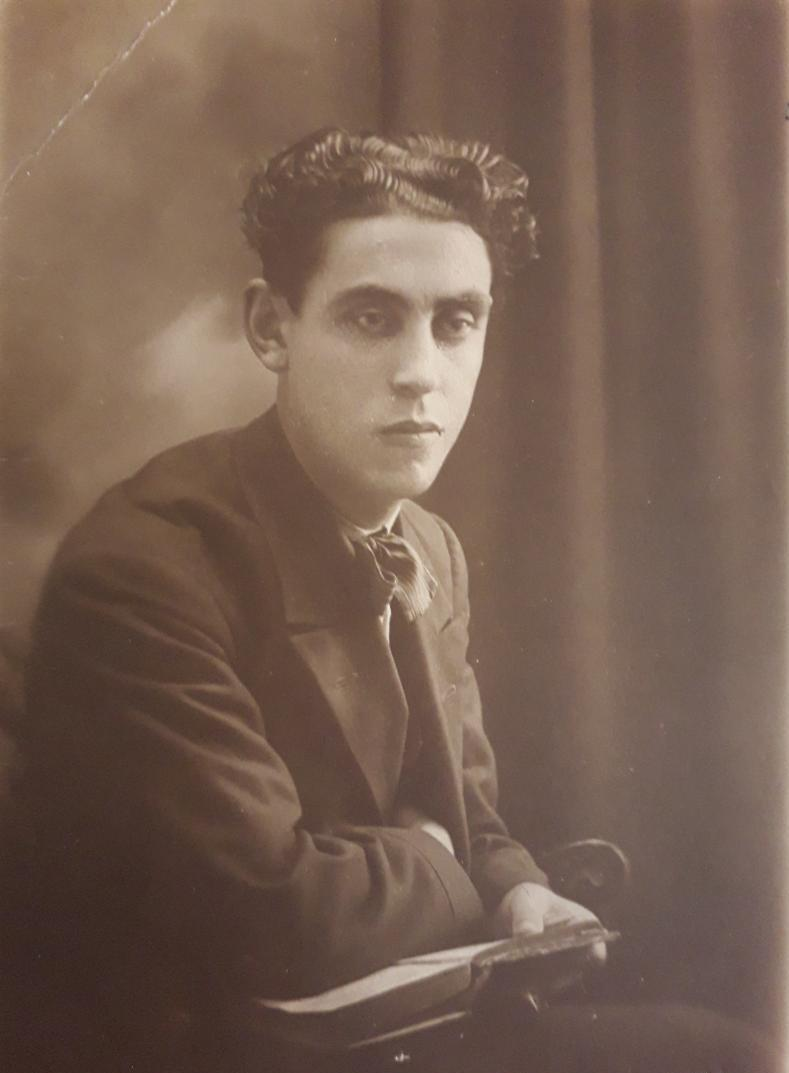 Portrait de Nichan Béchiktachlian